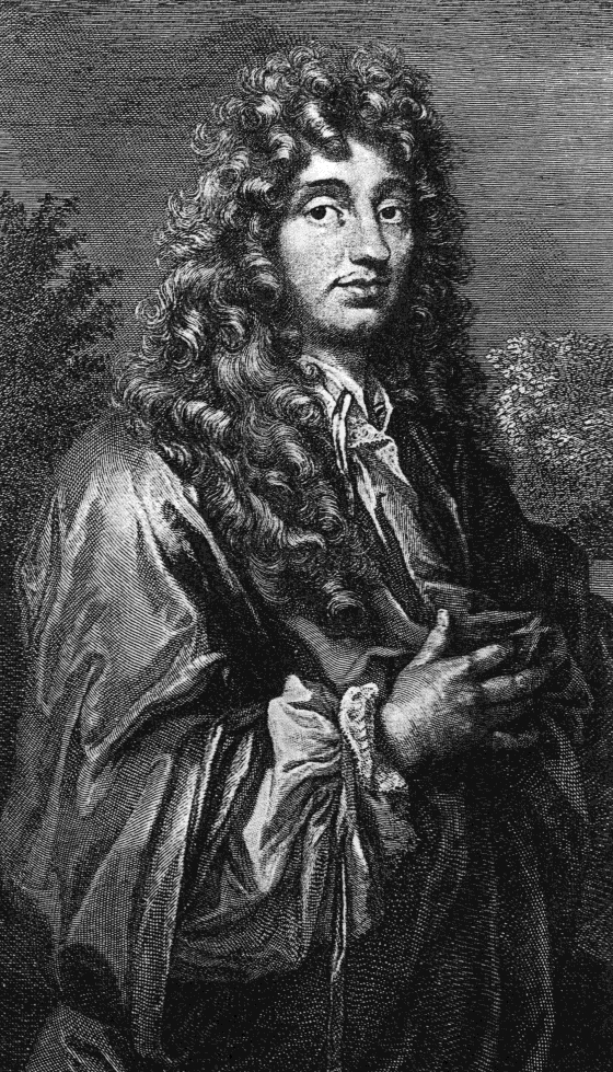 sujet: Christiaan Huygens licence: Catégorie:Image d'astronomie